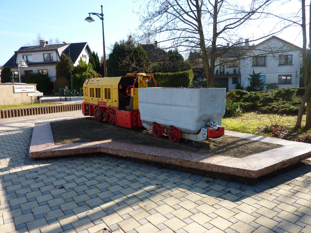 locotracteur